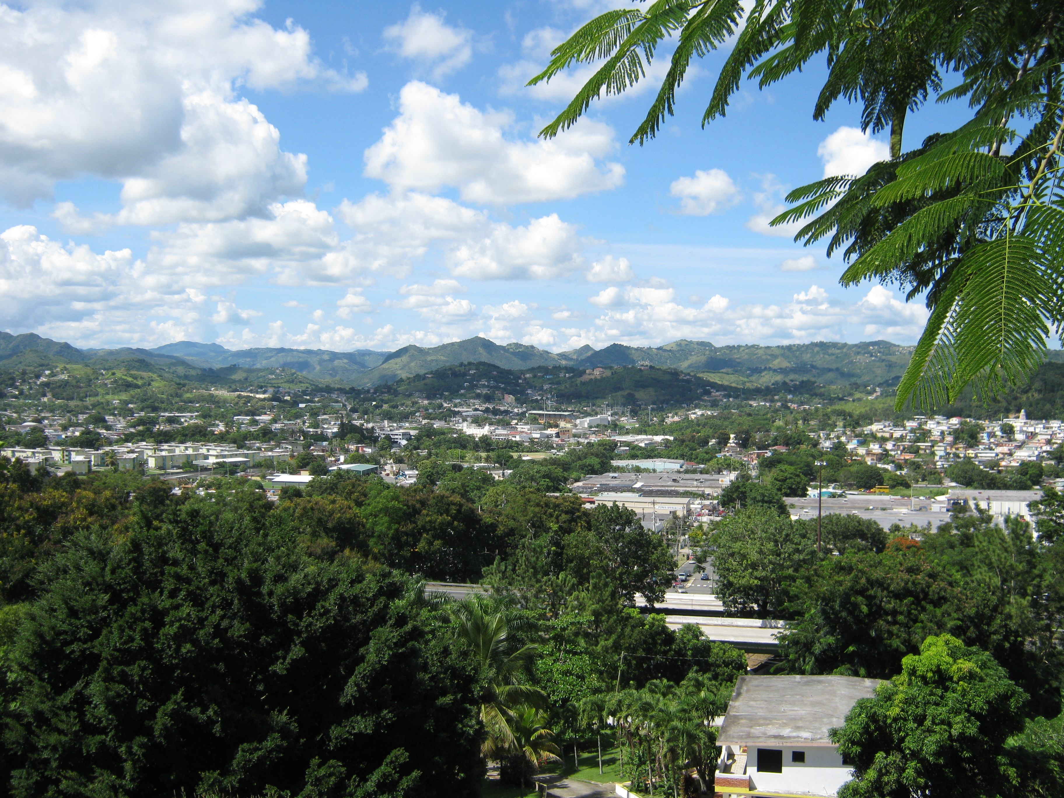 Pueblo de Cayey, Puerto Rico desde la carretera 15